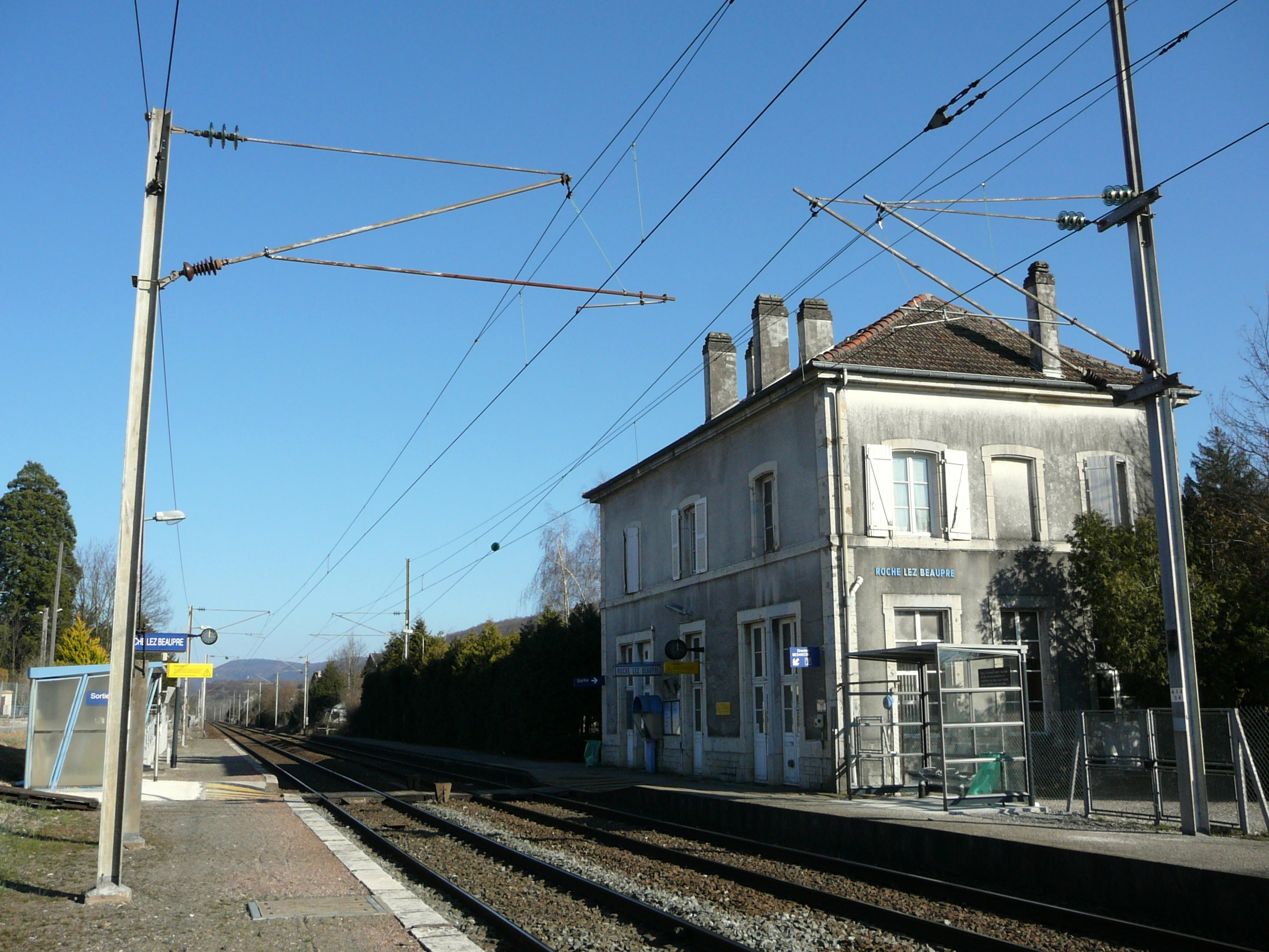 Vue en direction de Montbéliard